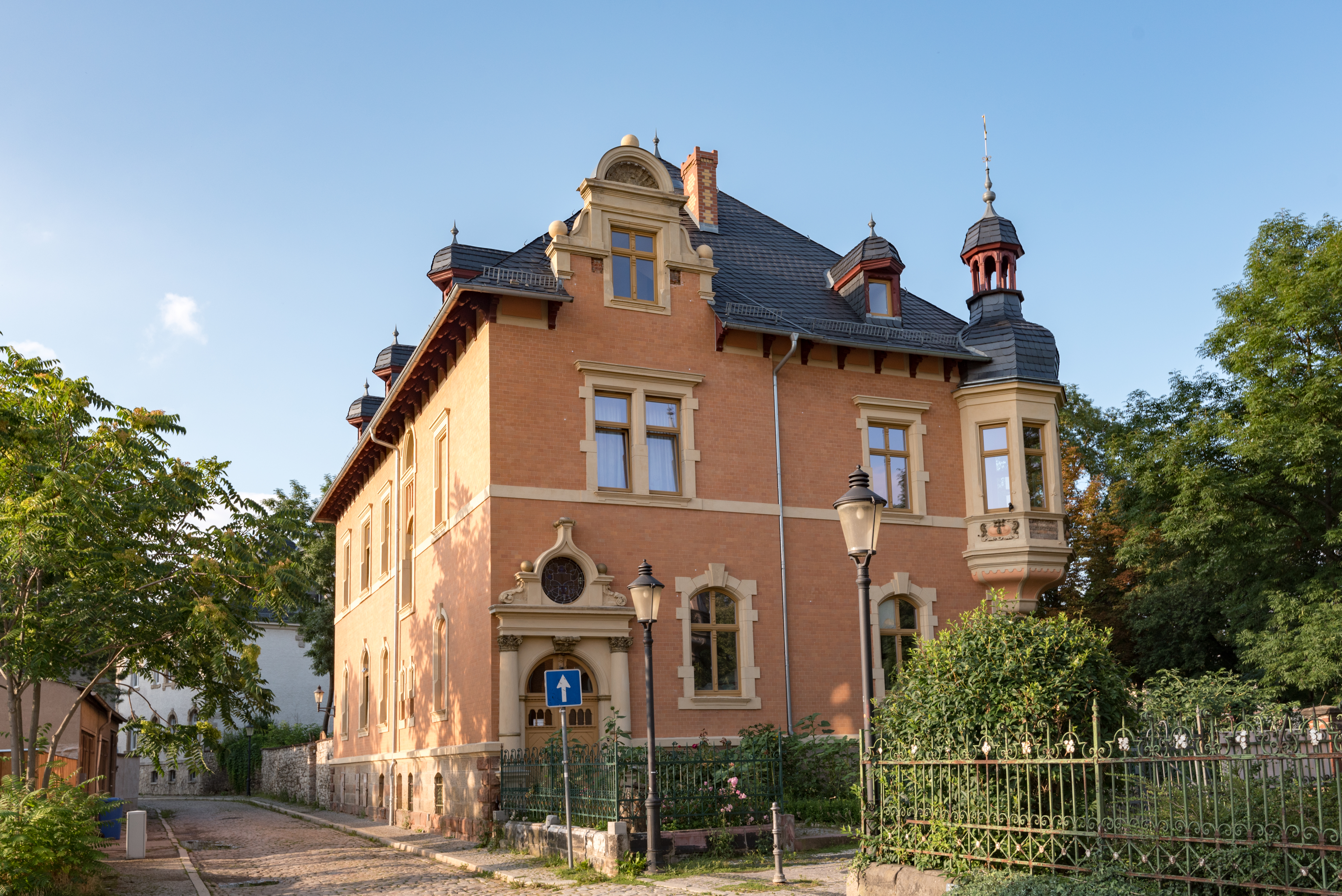 Naumburg (Saale), Marienmauer 18